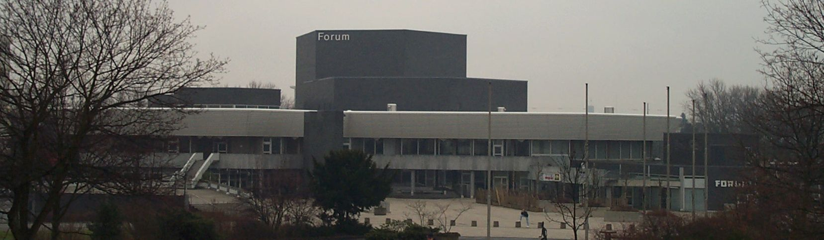 Kultur- und Veranstaltungszentrum "Forum" in Leverkusen